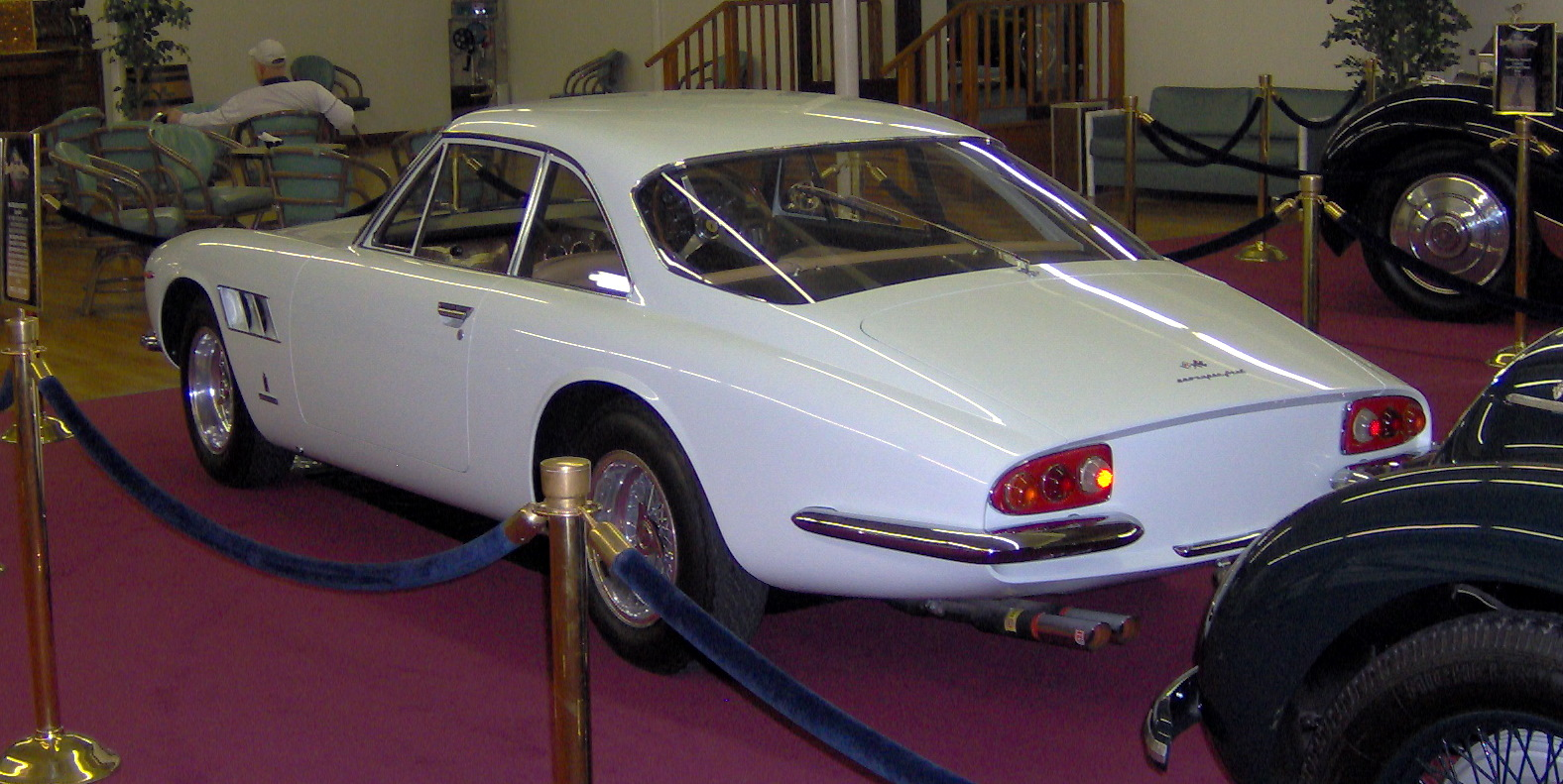 1966 Ferrari 500 Superfast